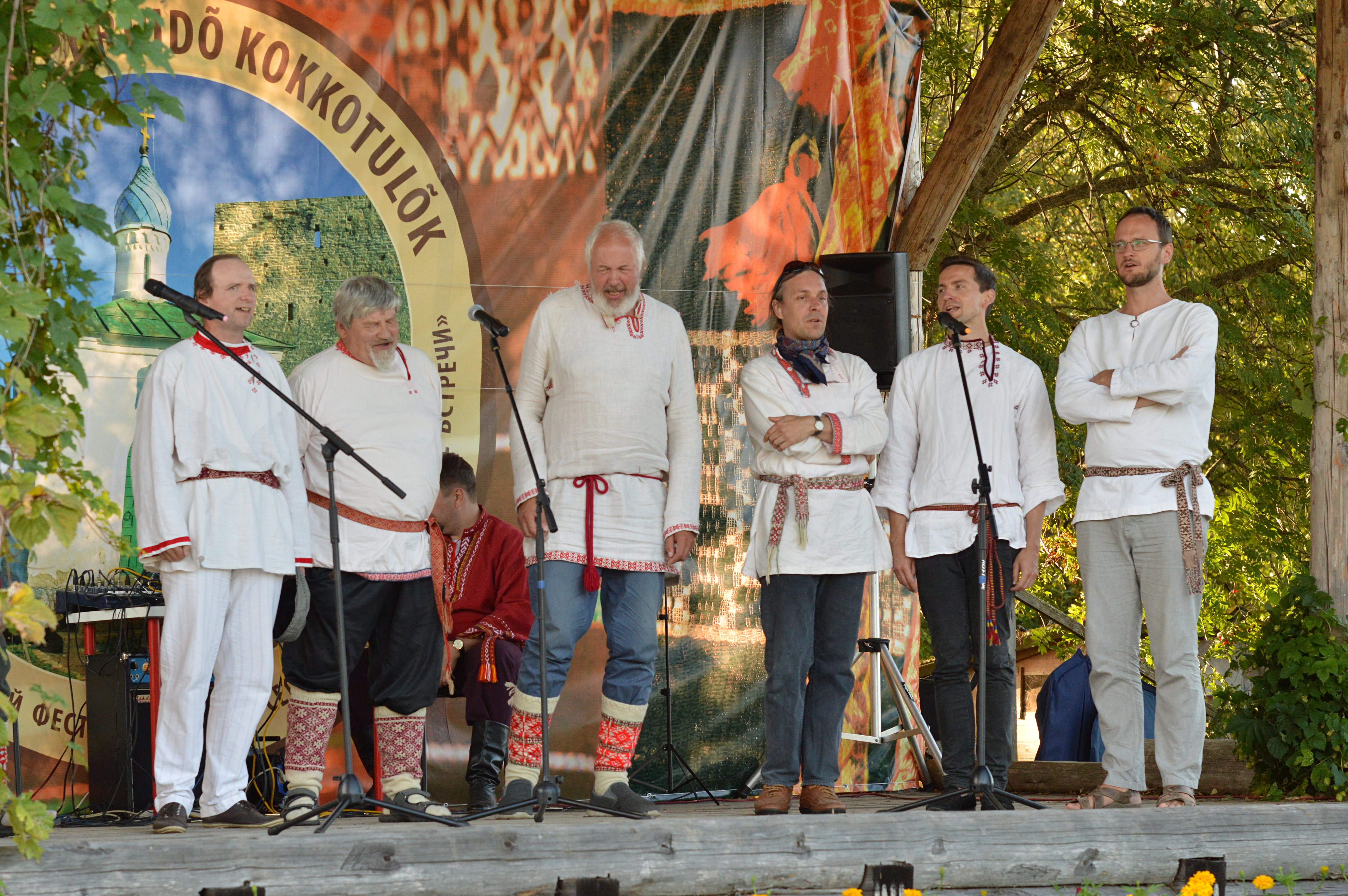 Liinatsuraq. Seto kultuuri festival Radajal. Vasakult Urmas Kalla, Paul Hagu, Aado Lintrop, Lauri Sommer, Andreas Kalkun, Jüri Metssalu